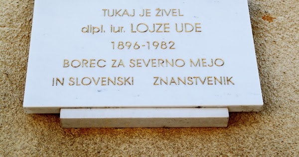 Lojze ude